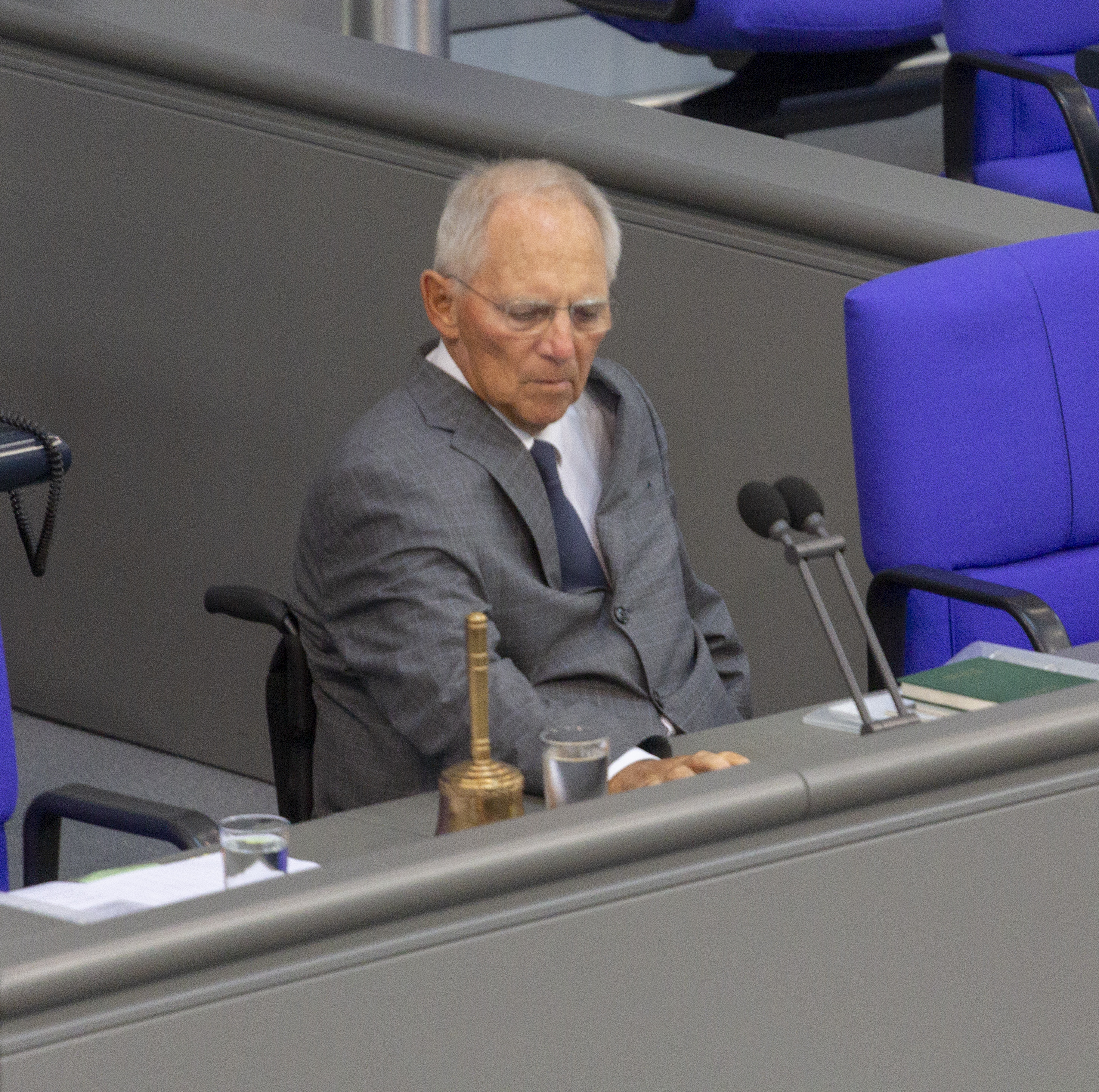 Wolfgang Schäuble während der Plenarsitzung des Deutschen Bundestages am 26. Juni 2019 in Berlin.